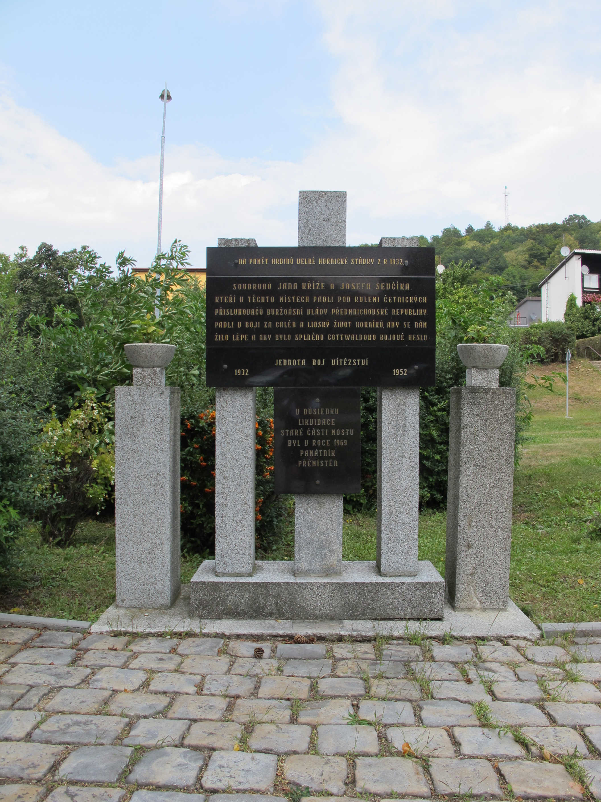 Pomník hrdinům Velké mostecké stávky (Most), v parčíku u křižovatky ulice SNP a aleje Boženy Němcové, Most